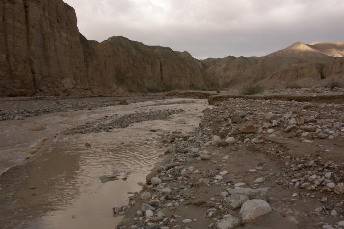 נחל אוג בזמן שיטפון